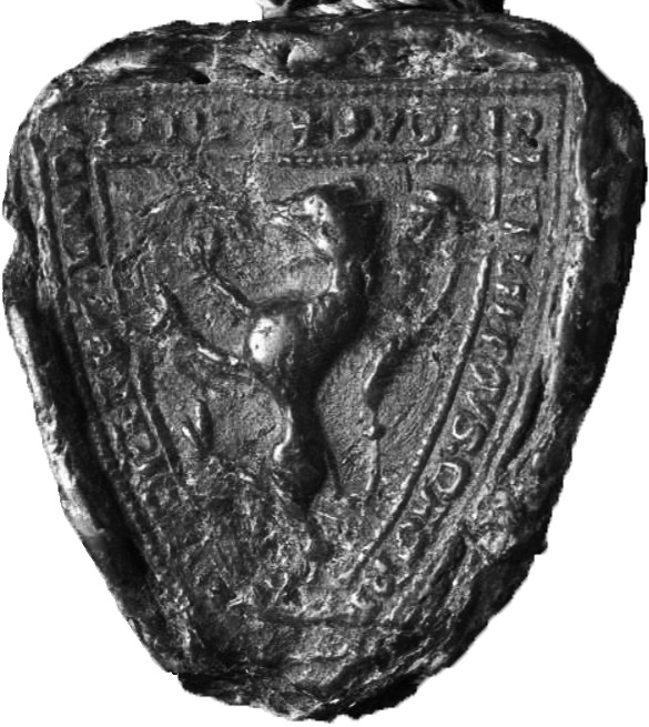 Csák nb. Ugrin lovászmester pecsétje, 1274